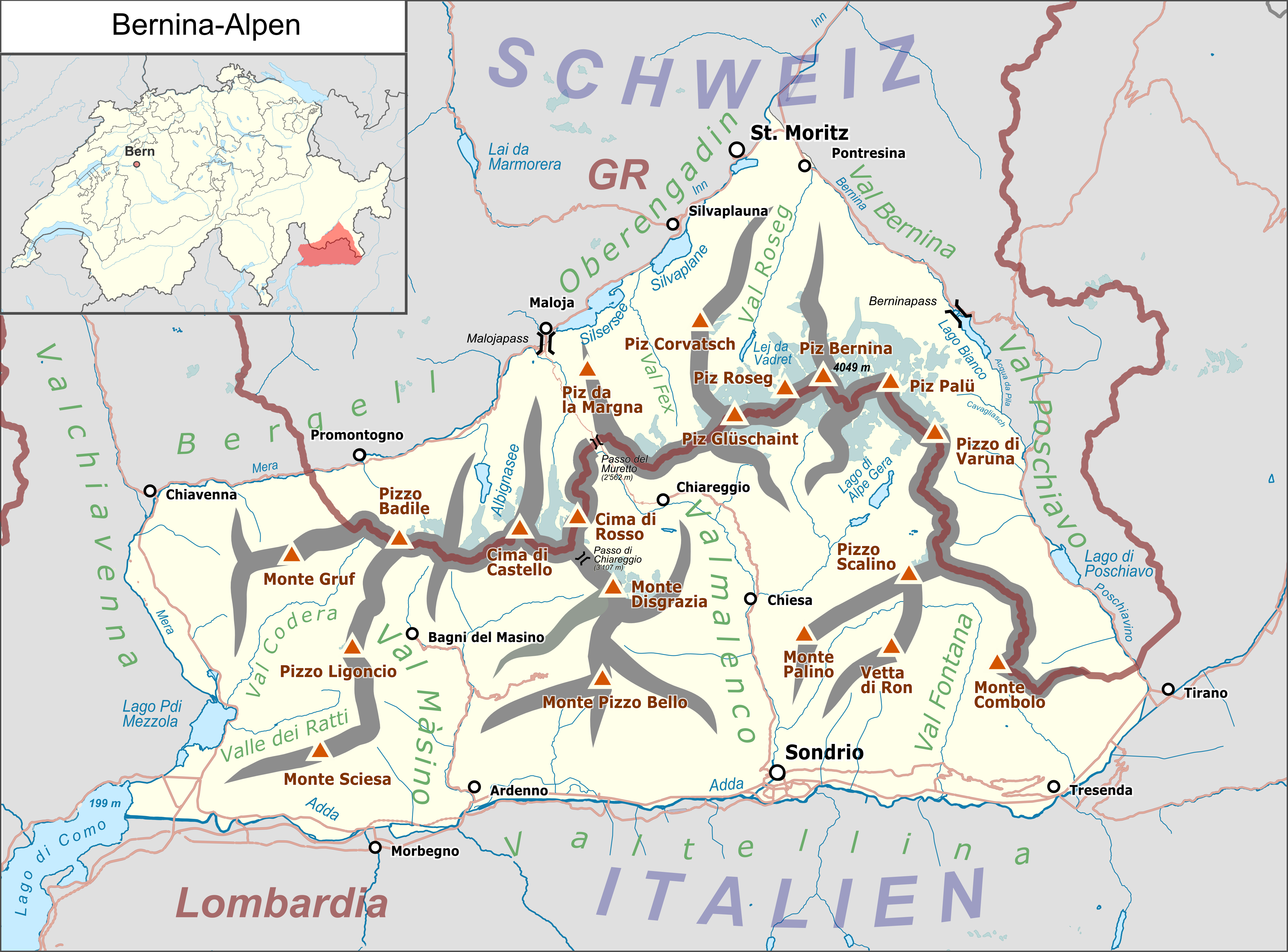 Lagekarte der Bernina-Alpen